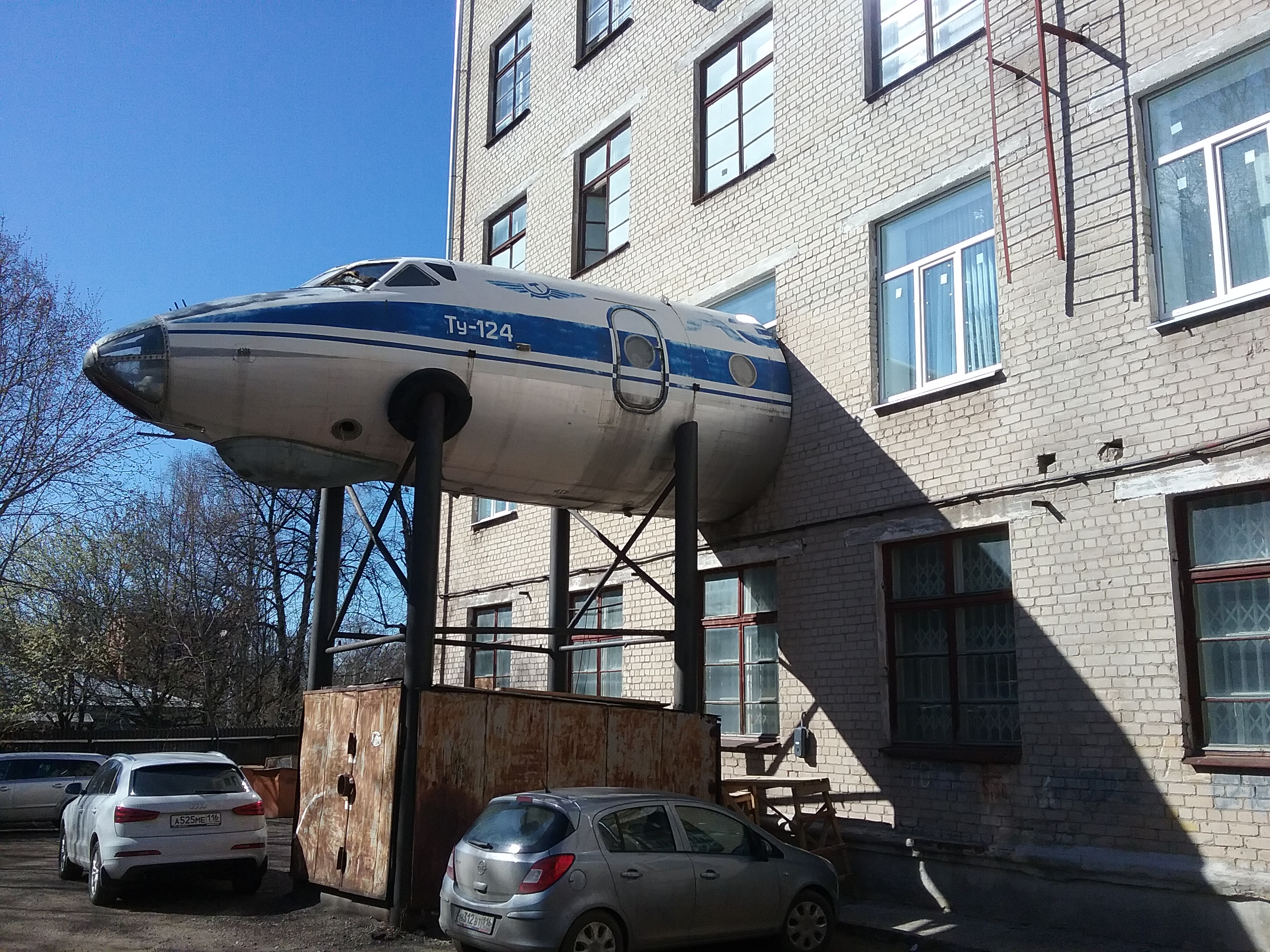 КНИТУ-КАИ 3 здание, нос самолета Ту-124, лаборатория кафедры электрооборудования